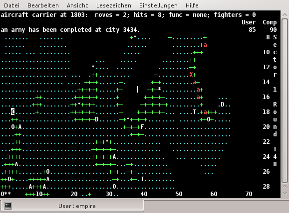 Empire 5.1 on a KDE Linux system